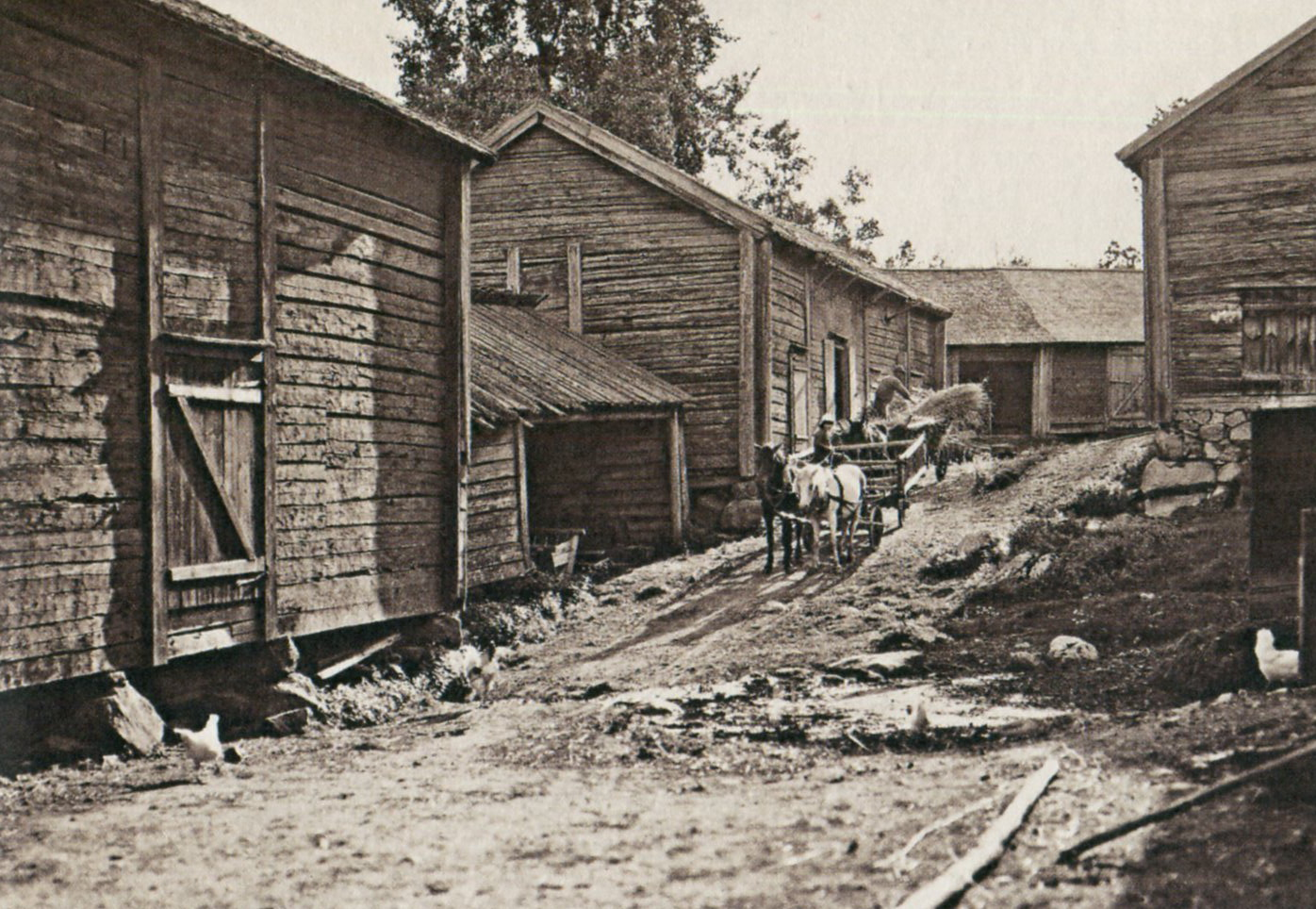 Stensjö by historisk bild